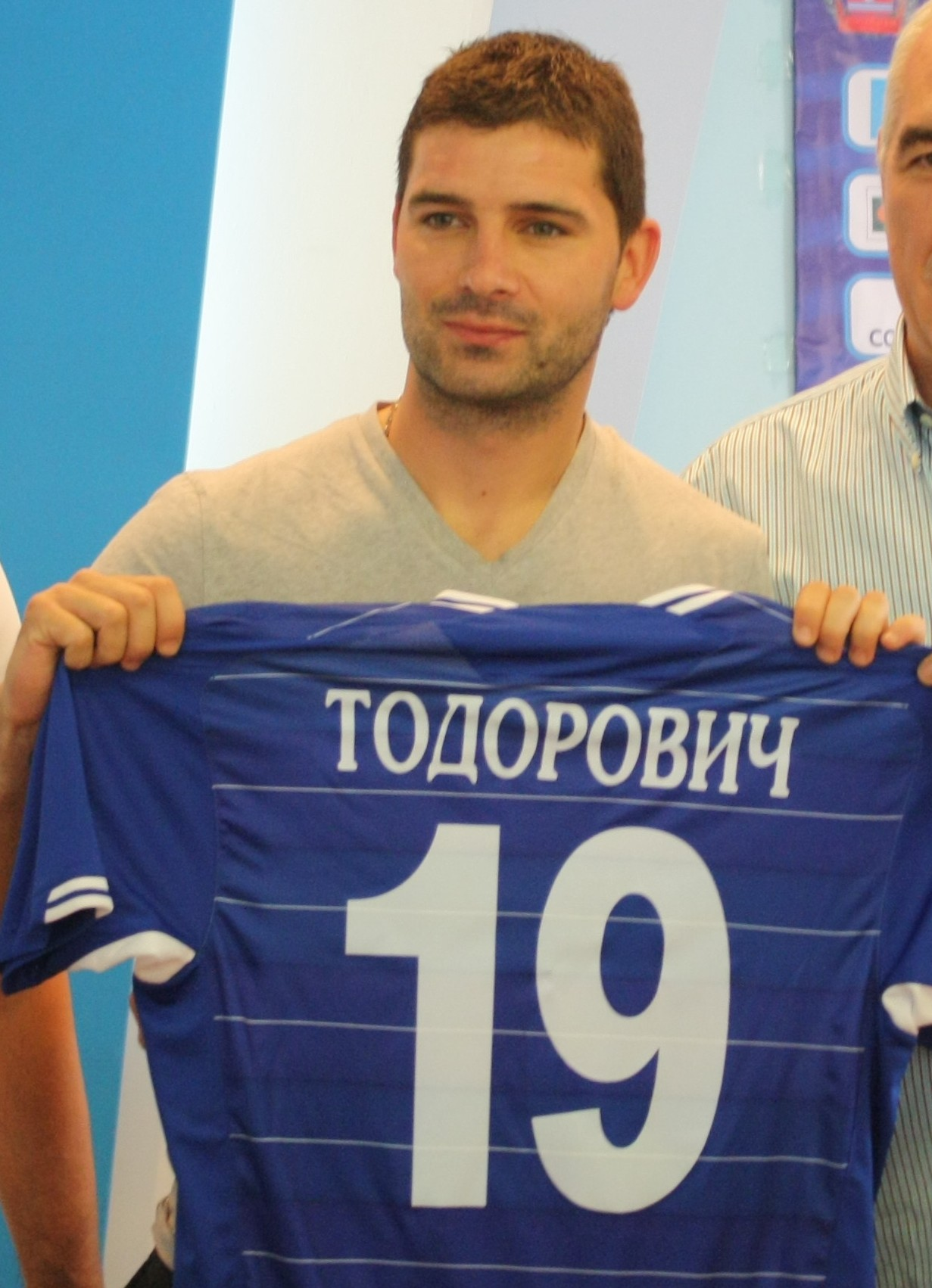 Иван Тодорович, футболист